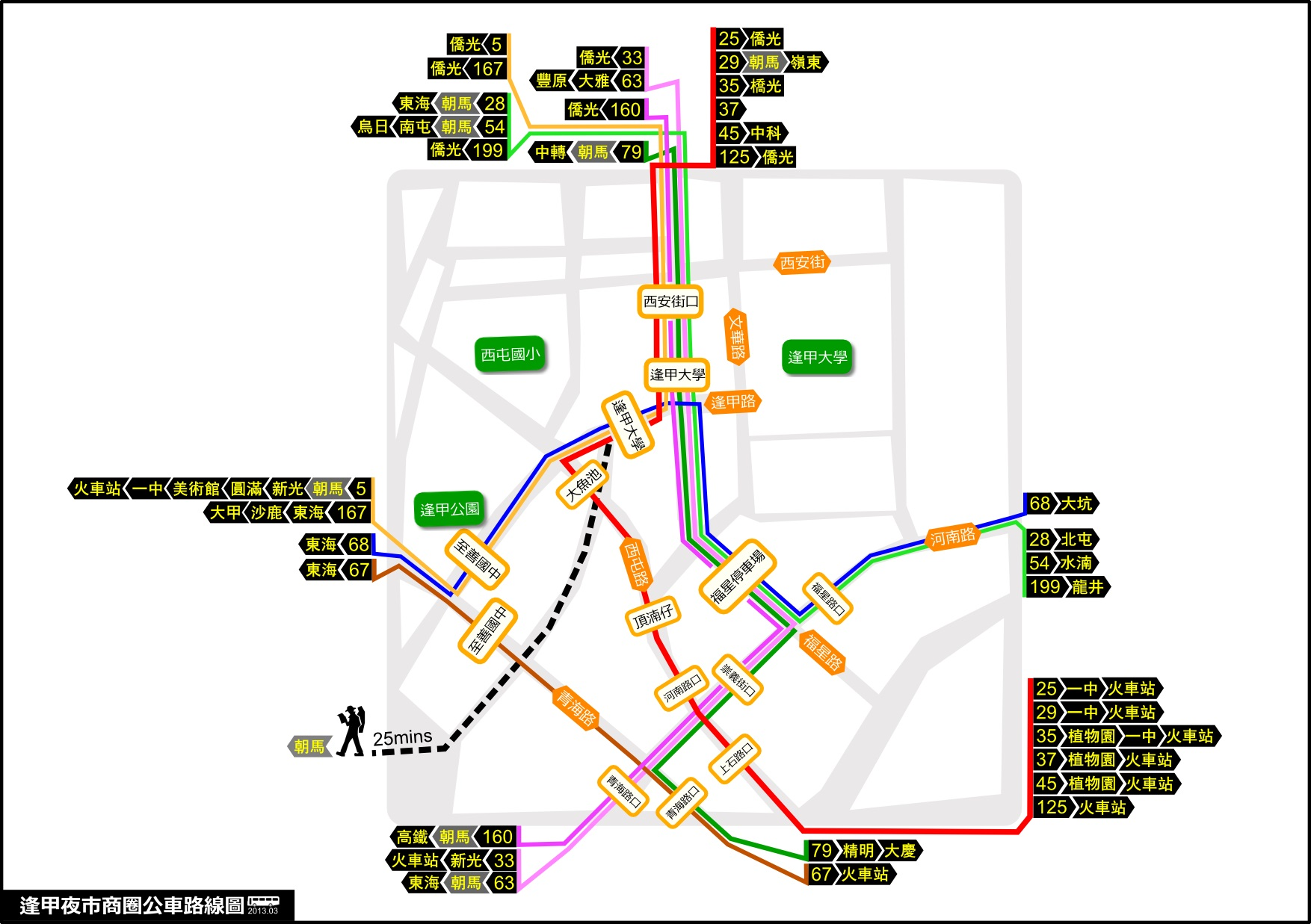 逢甲夜市商圈公車路線圖